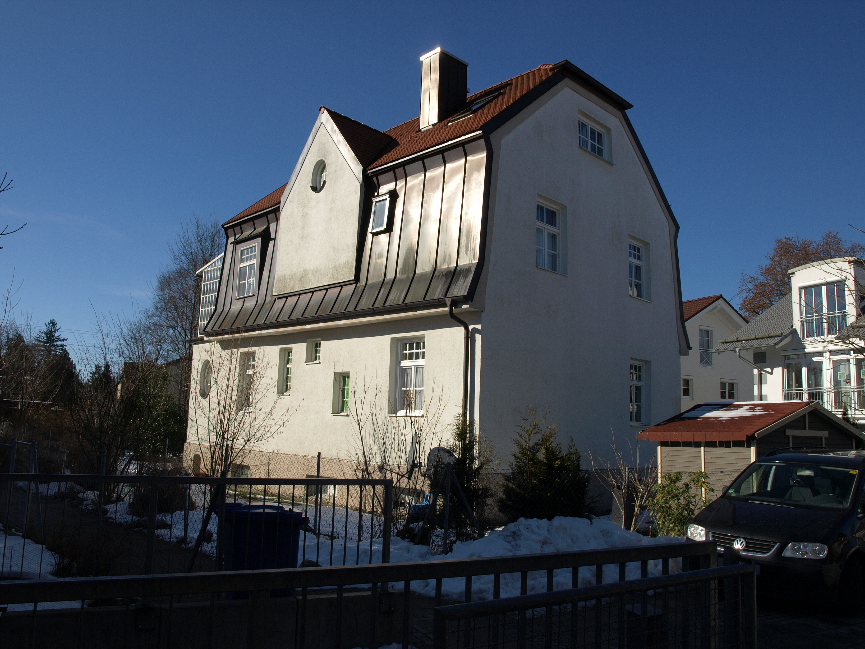 Riemerling Nonnenweg 2d Villa und ehemaliges Wohnhaus des Komponisten Ermanno Wolf-Ferrari (1915-1926)